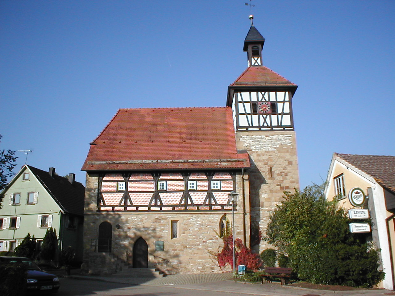 Unteres Kirchle in Langenbeutingen. Erstmals erwähnt 1354, 1512 spätgotisch uumgestaltet, 1627 mit alemannischem Fachwerk aufgestockt und 1830 mit fränkischem Fachwerkturm vollendet. Im Dachgeschoss befindet sich seit 2004 die Alfred-Goes-Stube.